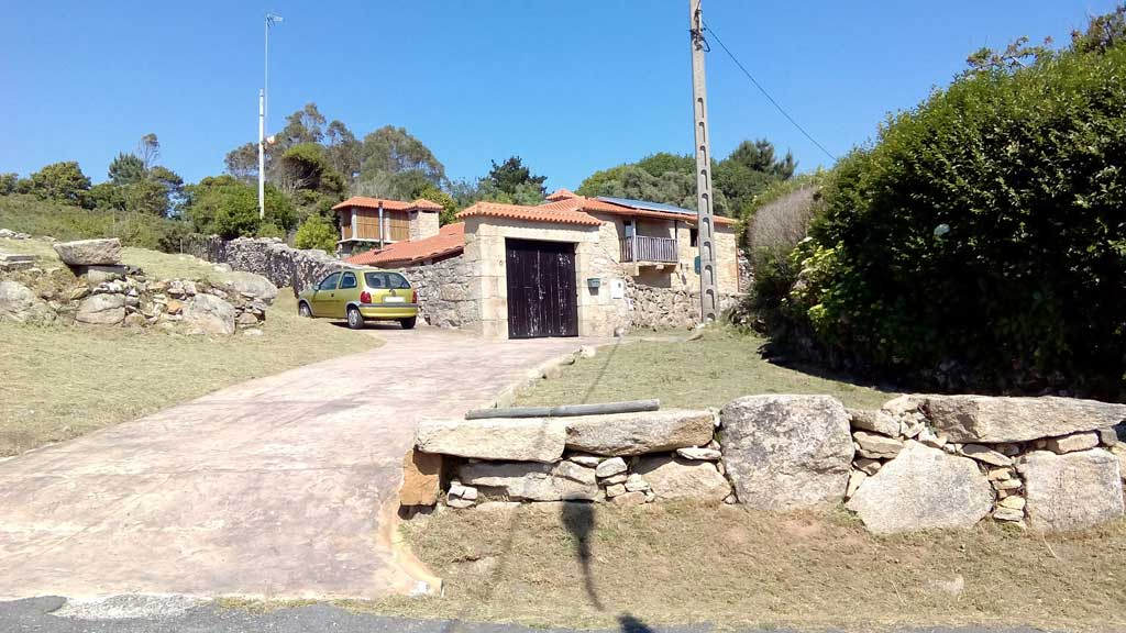 Vista dunha casa do Pieiro, Doniños.